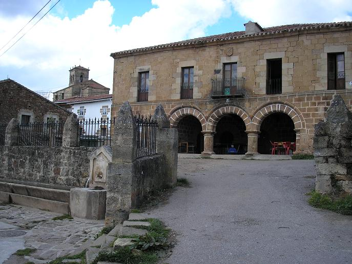 El Chigri, La fuente y La iglesia